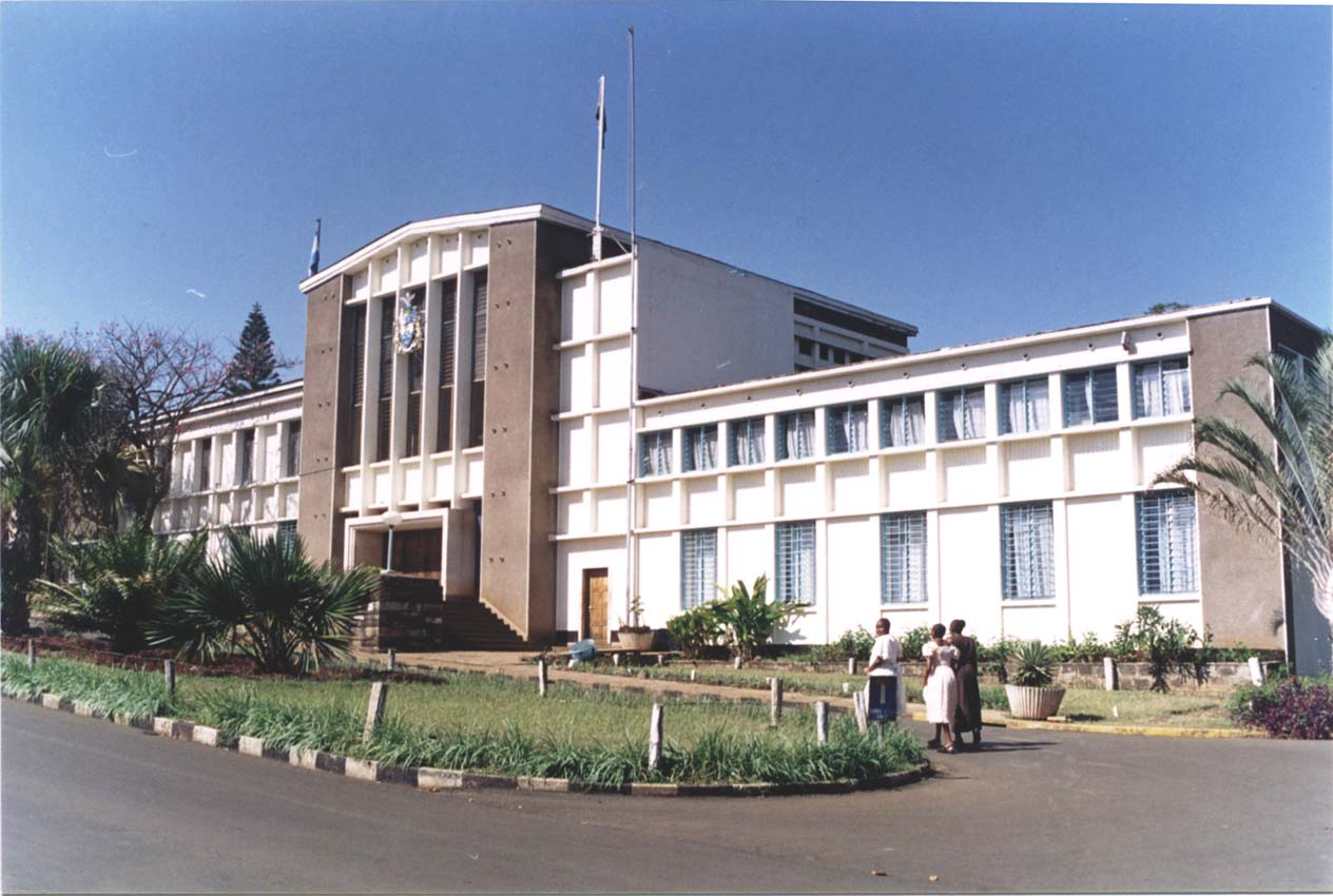 Hôtel de ville de Kisumu